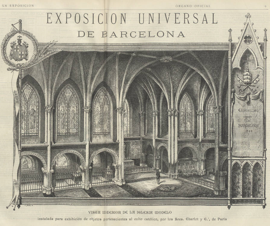 Interior de la Iglesia Modelo, grabado de la revista La Exposición, Núm. 49, 8 de mayo de 1888.